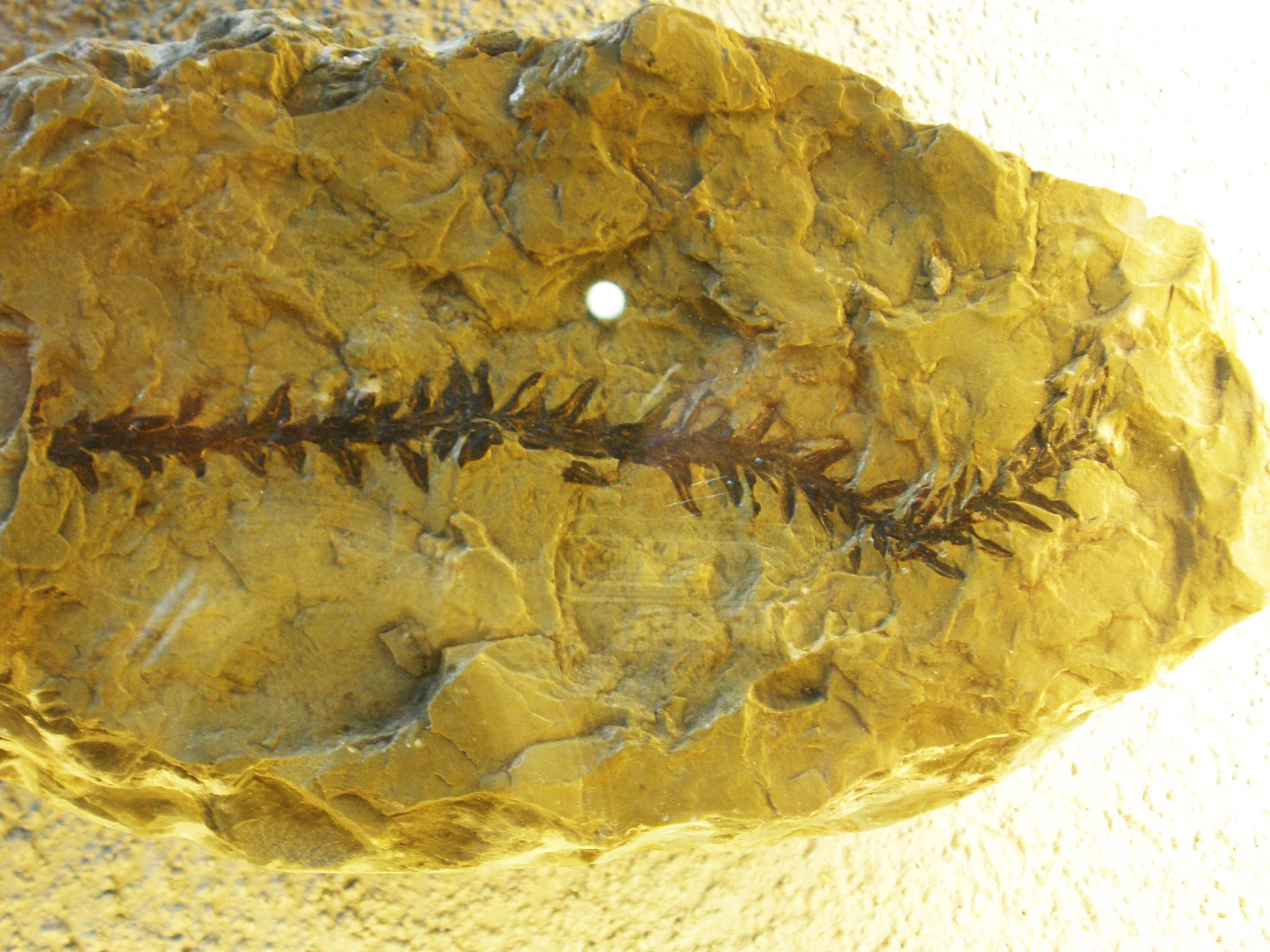 Fossil of Voltzia, an extinct plant- Took the photo at Naturalis museum, Leiden